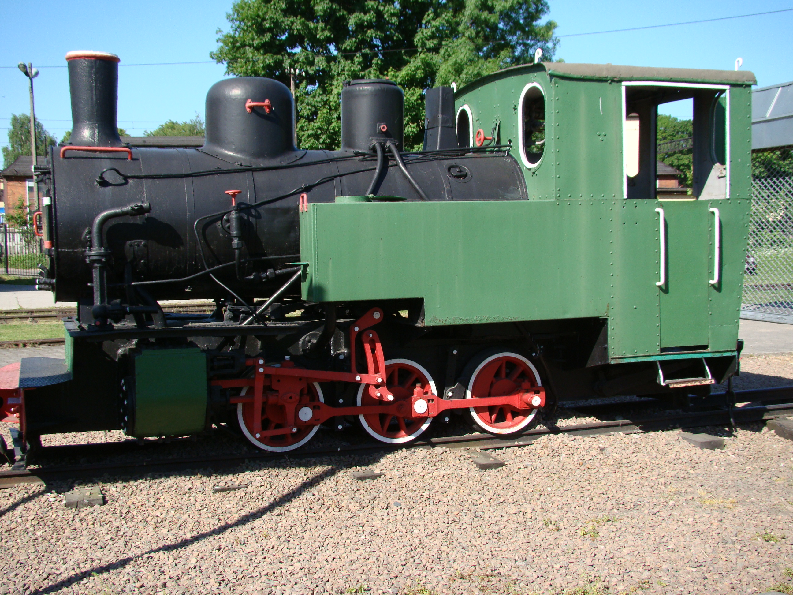 Ełcka kolej dojazdowa-układ przestrzenny (zabytek nr A-3194)